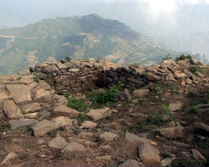 नेपाली: लिगलिगकोट भग्नावशेष